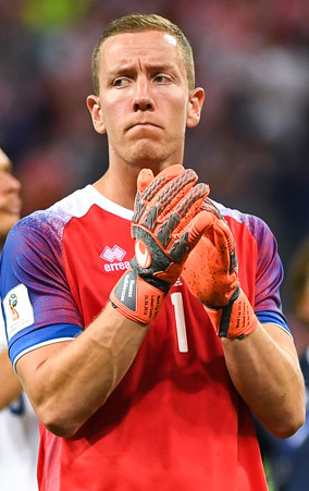 Сборная Исландии уступает Хорватии и покидает ЧМ-2018